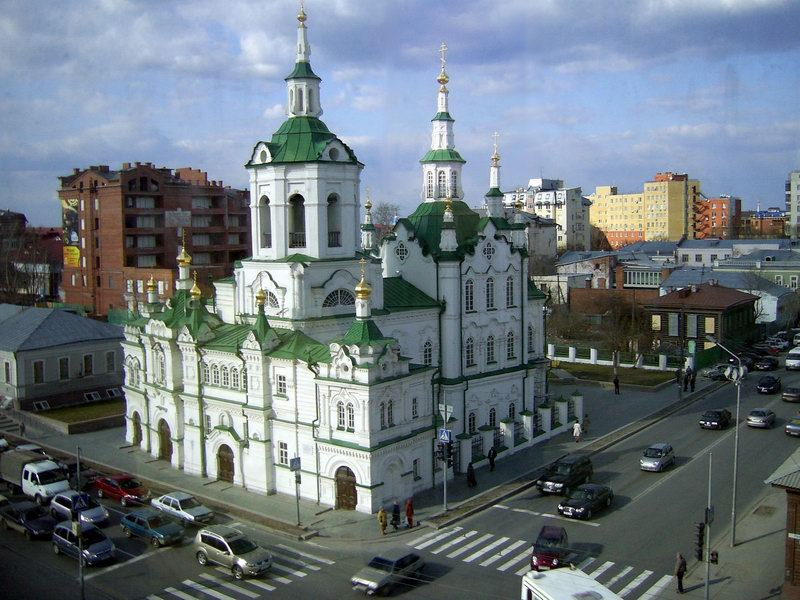 La preĝejo de la Savanto (Tjumeno, Rusio)